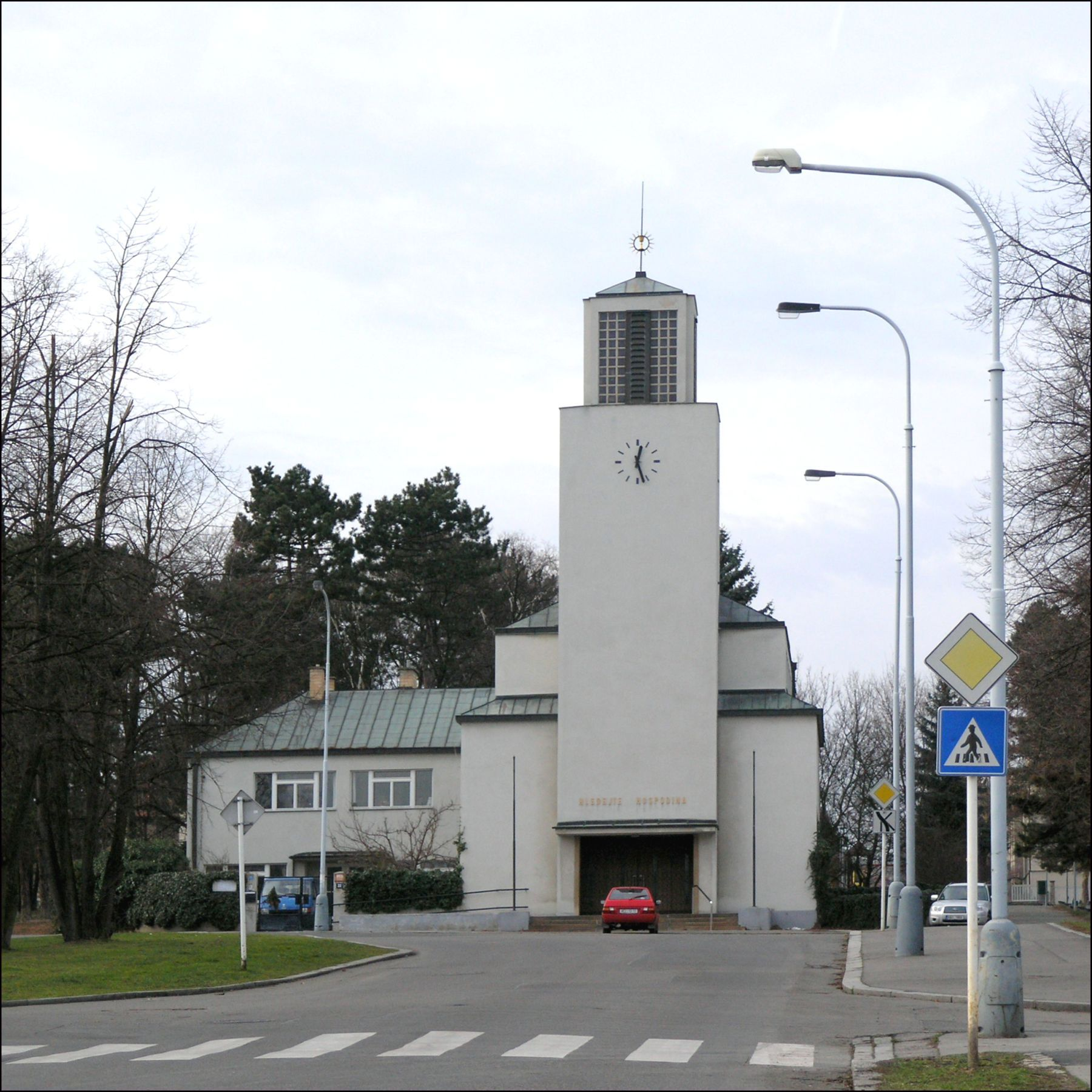 Praha, Střešovice - evangelický kostel na náměstí Před Bateriemi, architekt Bohumír Kozák